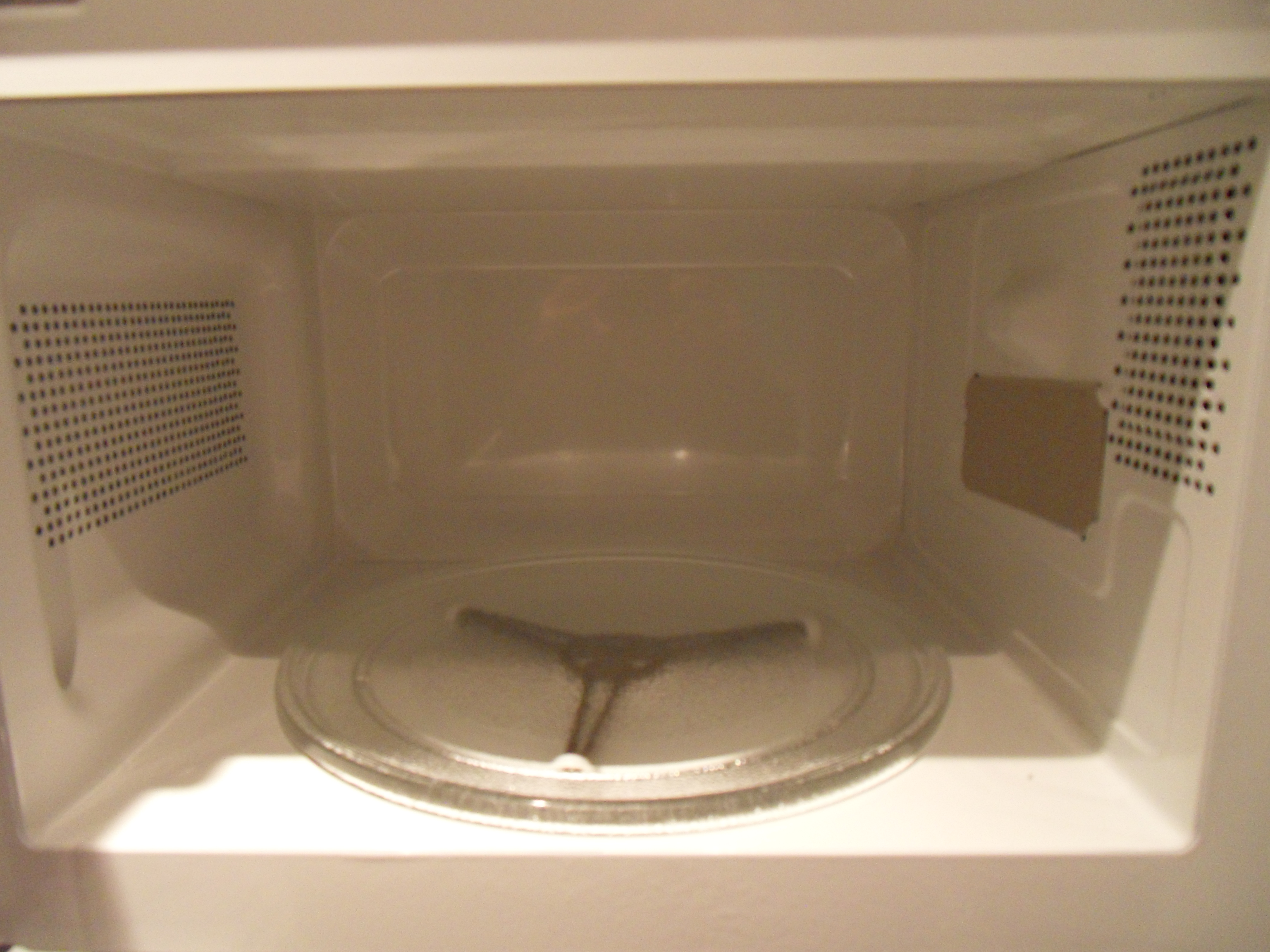 De binnenkant van een ProLine SM117 magnetron.